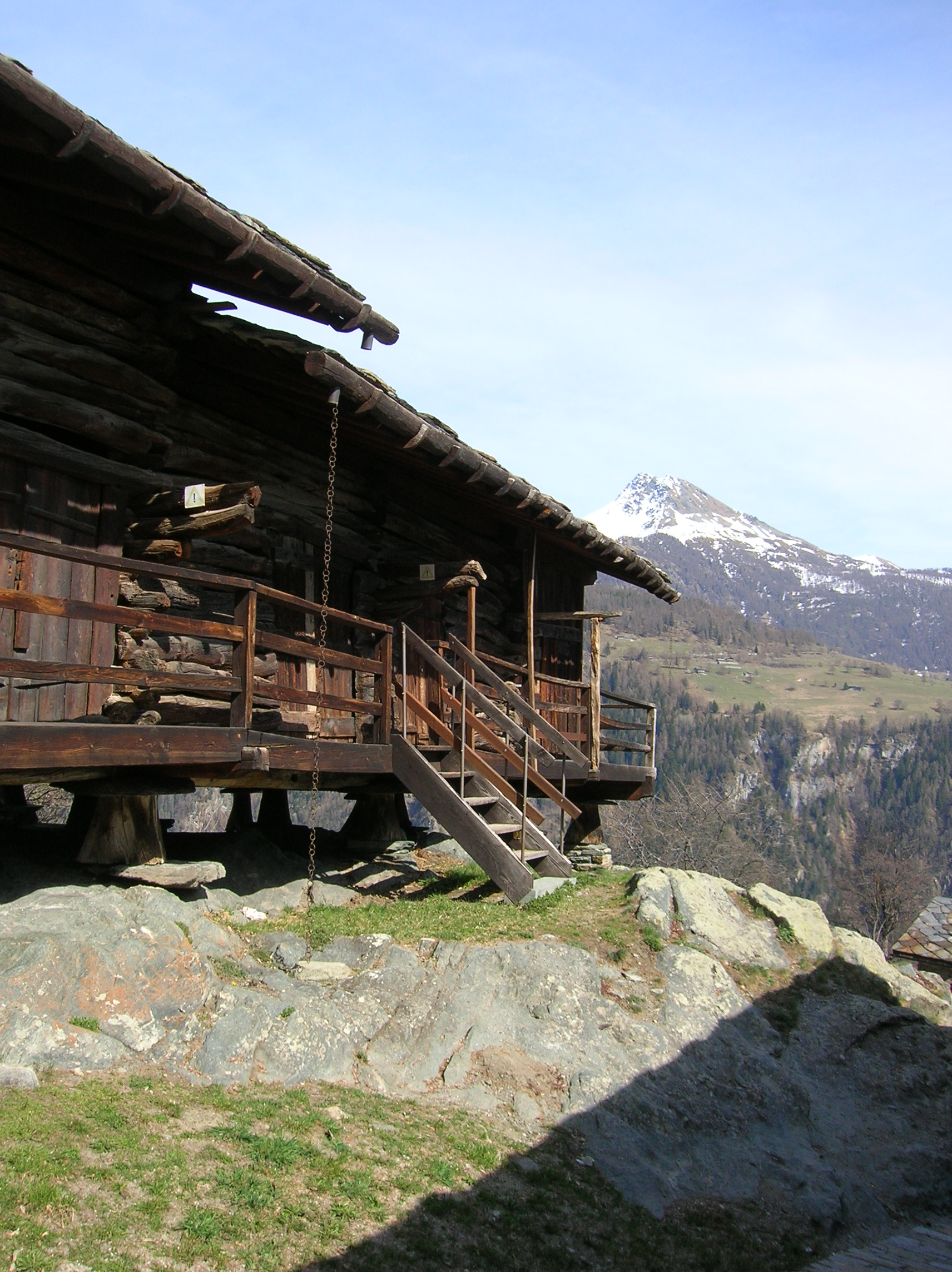 Il Museo Petit Monde di Triatel (frazione di Torgnon, Valle d'Aosta, Italia) si compone di un rascard a schiera costruito tra 1463 e 1503, una grange del Settecento e un granier del Cinquecento, restaurati ad ospitare un'esposizione sulla vita rurale (agro-pastorale) di montagna.